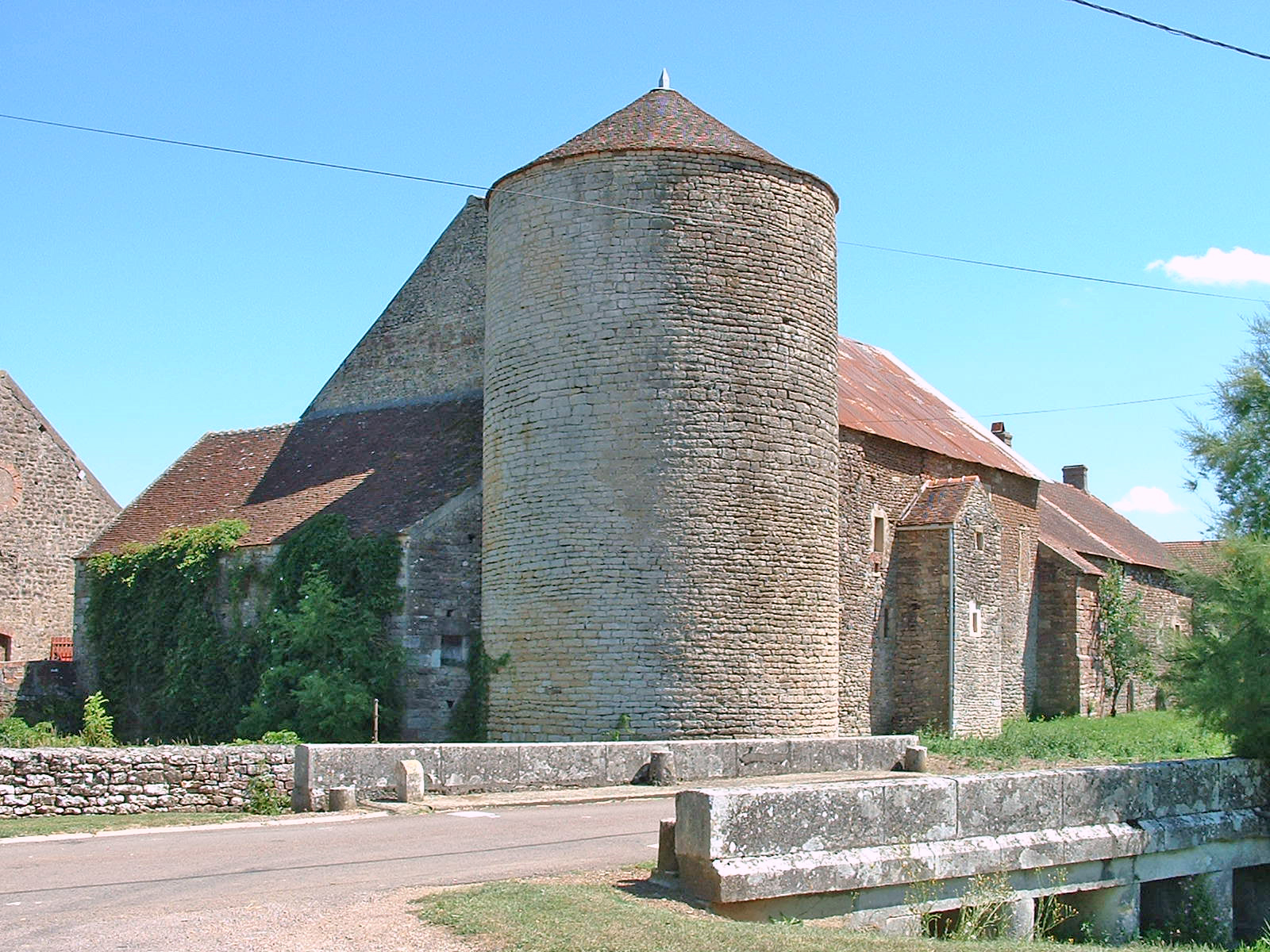 Maison-forte de Cisery, Yonne